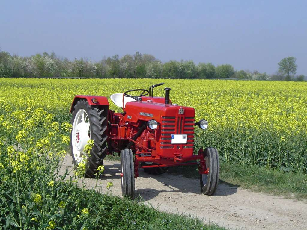 McCormick D432, Baujahr 1963/64, zwischen Rapsfeldern